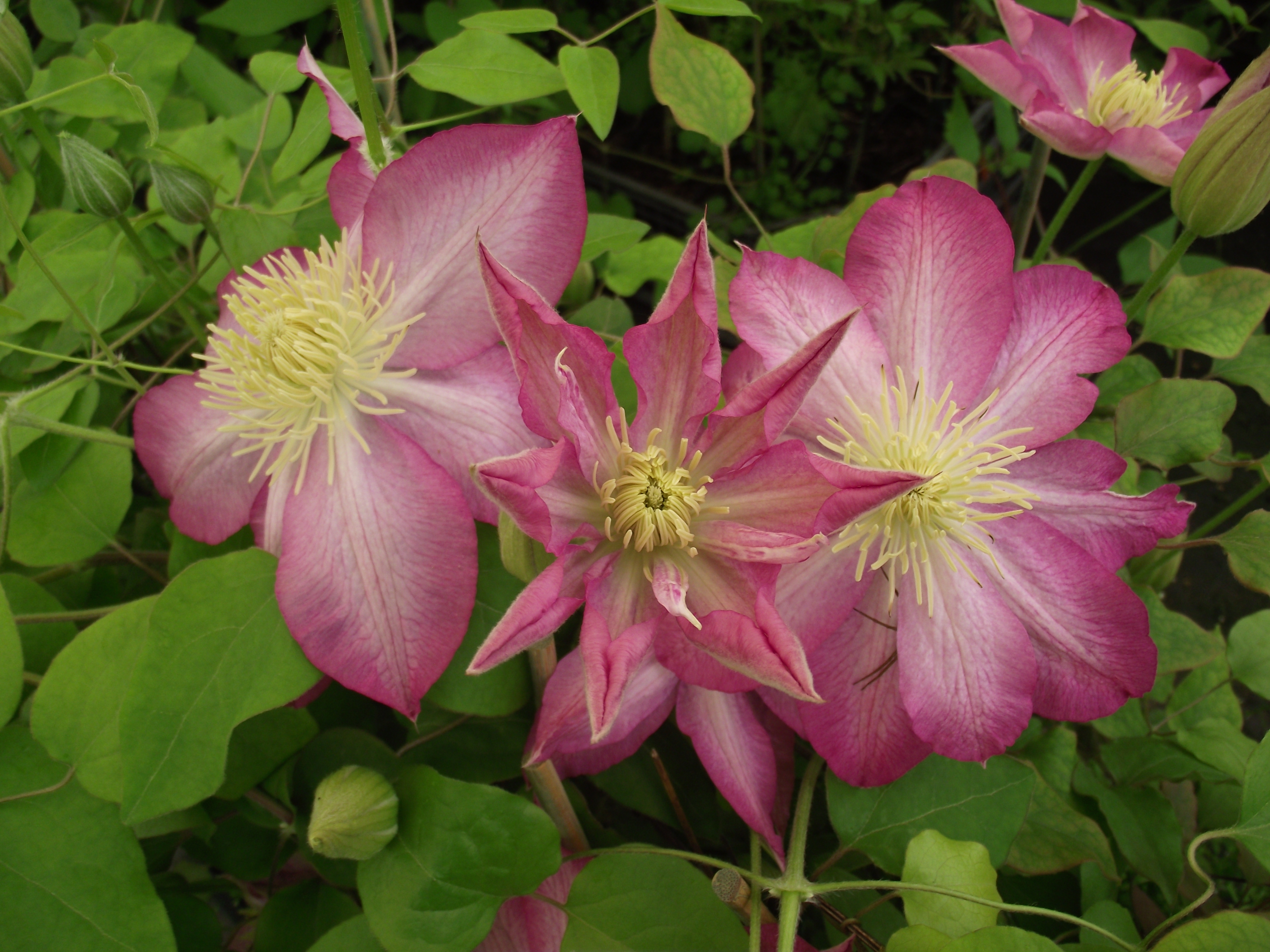 Clématite Patens X 'asao'